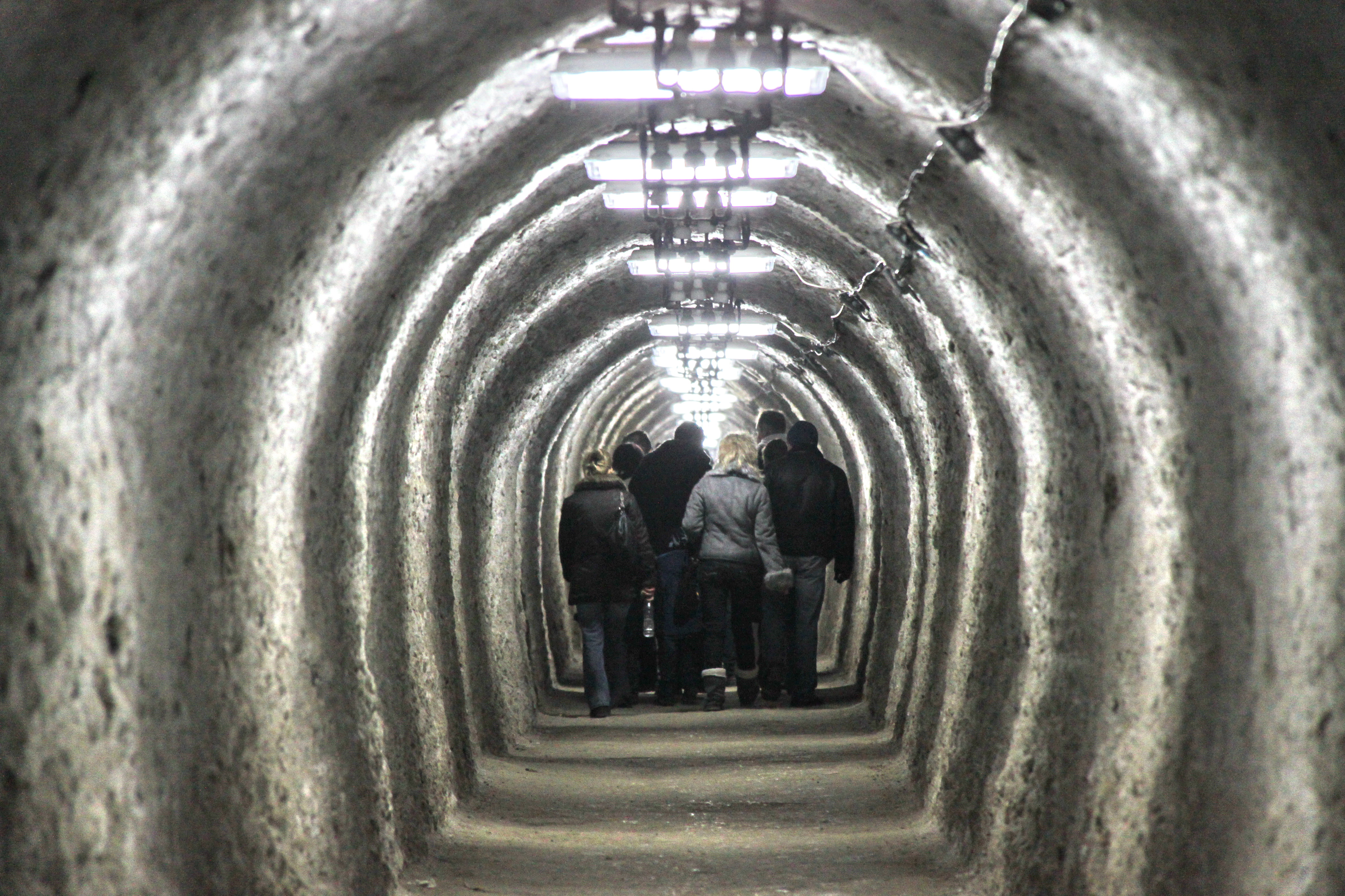 Salina Turda, galeria de acces Franz-Josef (porţiunea săpată în steril, in afara masivului de sare).